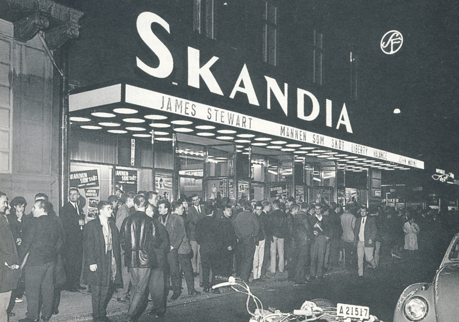 Biografen "Skandia" i Stockholm, entrén